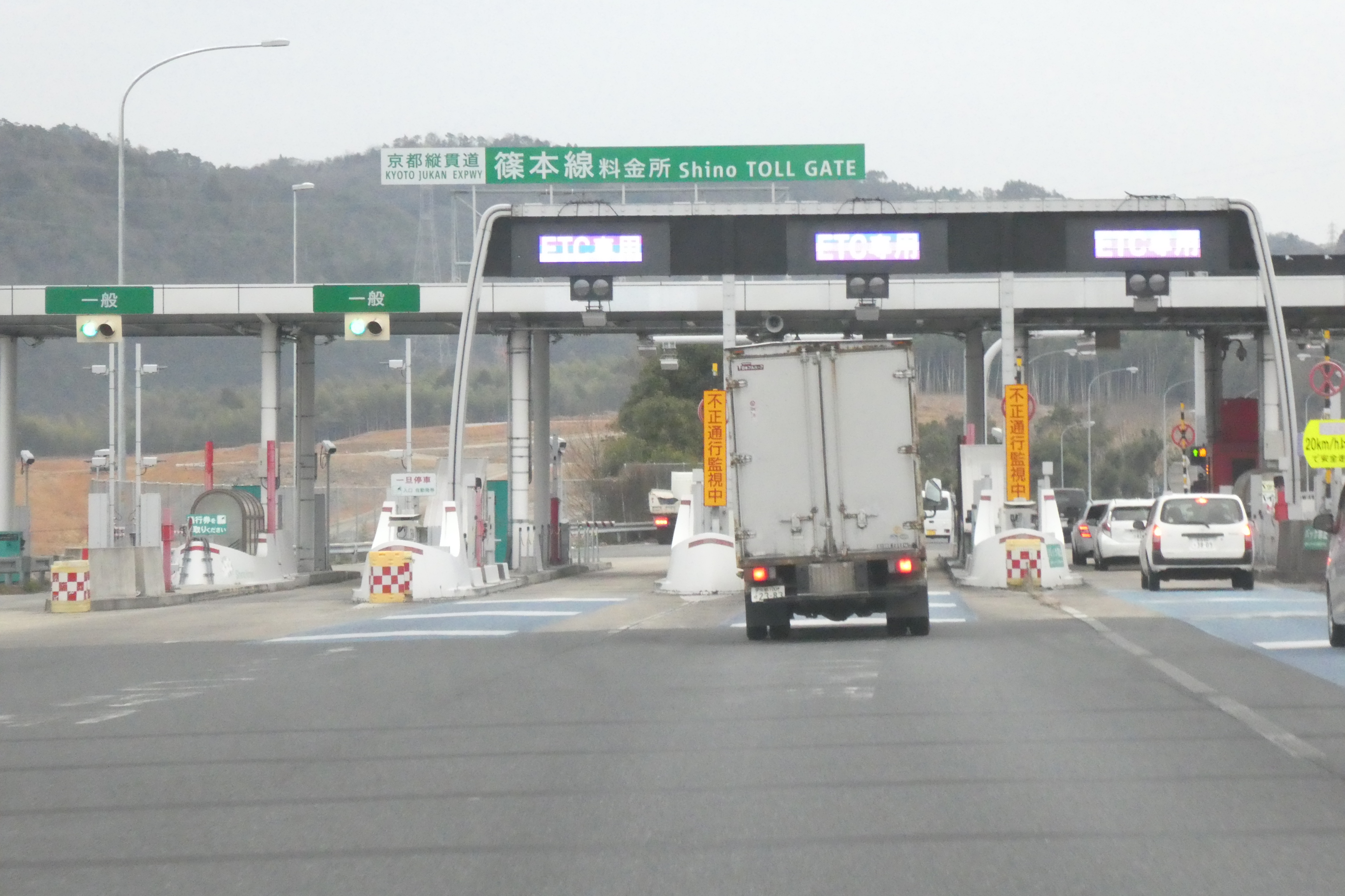 篠本線料金所（上り線・大山崎方面行き）